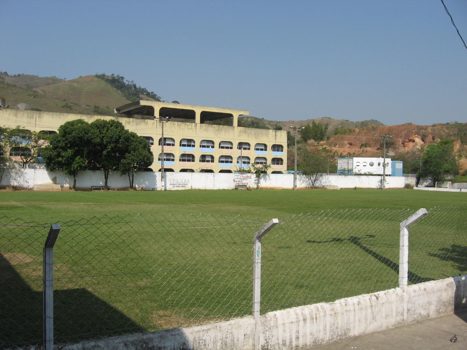 Estádio da Avenida dos Operários, do Brasil Industrial EC.